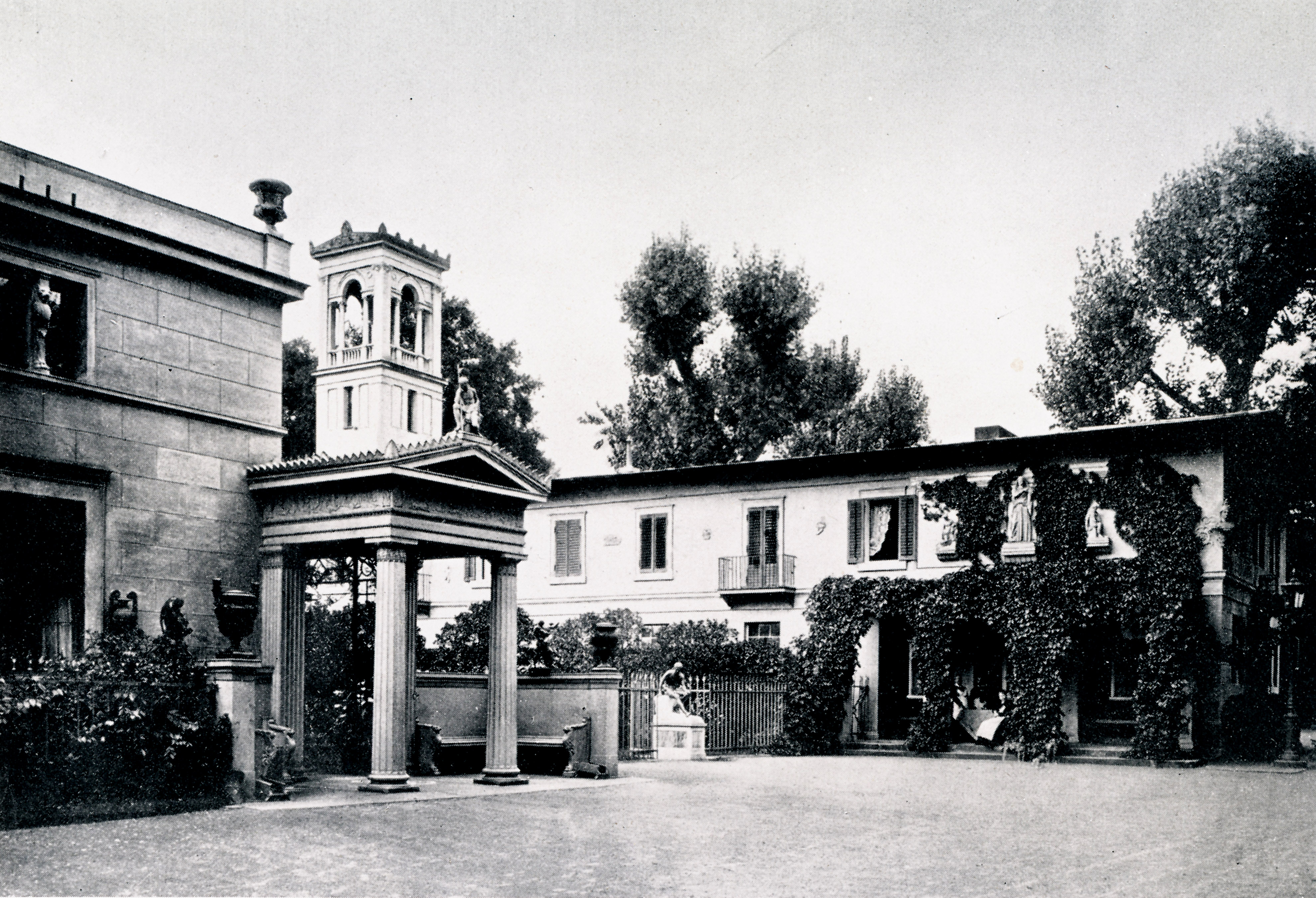 Die Vorfahrt am Schloss Klein-Glienicke, Foto von Robert Scholz 1874/75